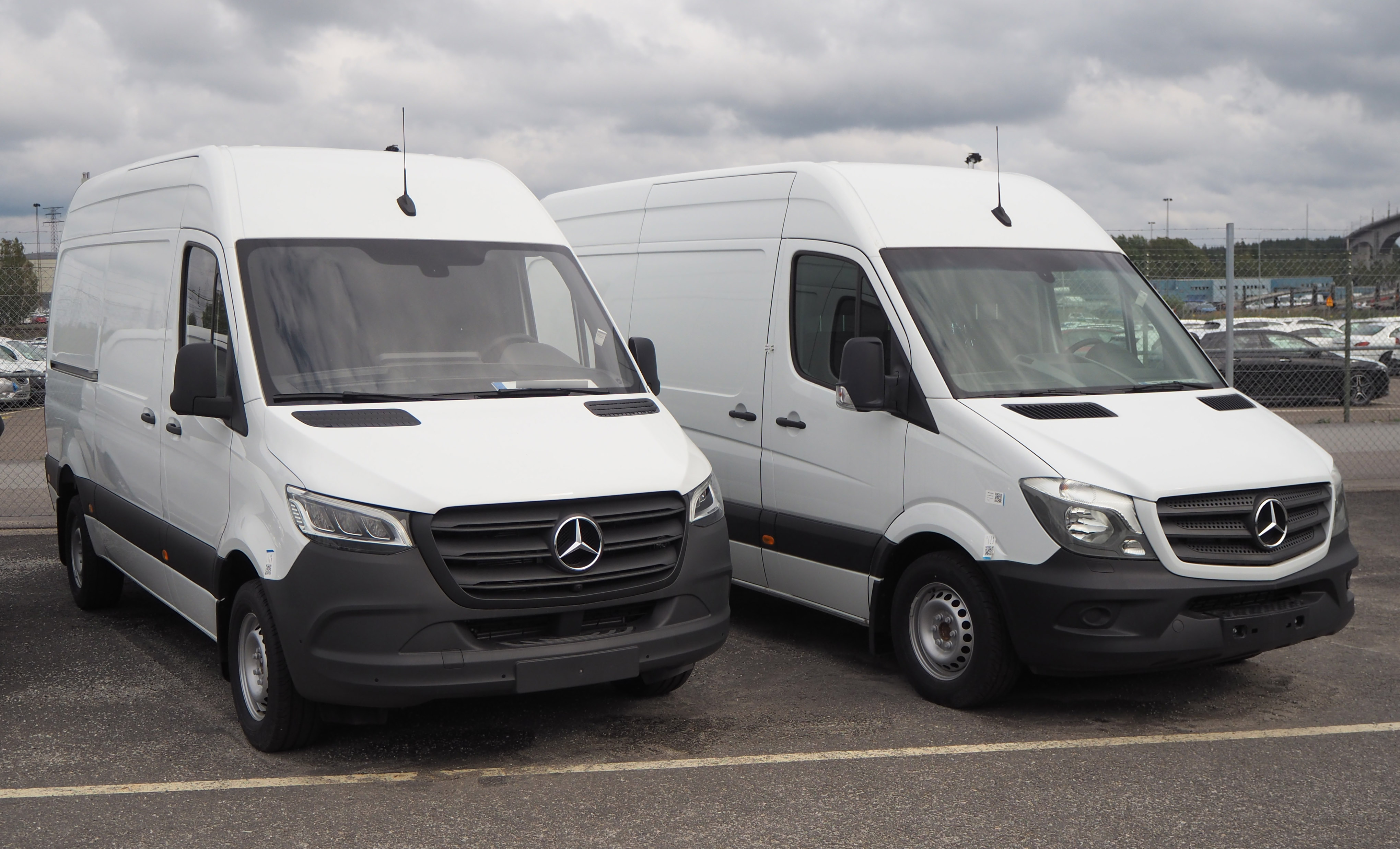 2018 Mercedes-Benz Sprinter 316 CDI Kastenwagen: dritte Generation (links), zweite Generation (rechts).